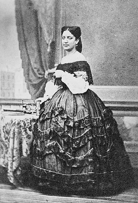 Ángela Peralta. Cantante de opera